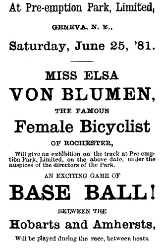 Werbung für einen Auftritt der Radsportlerin Elsa von Blumen, The Advertiser, 14. Juni 1881